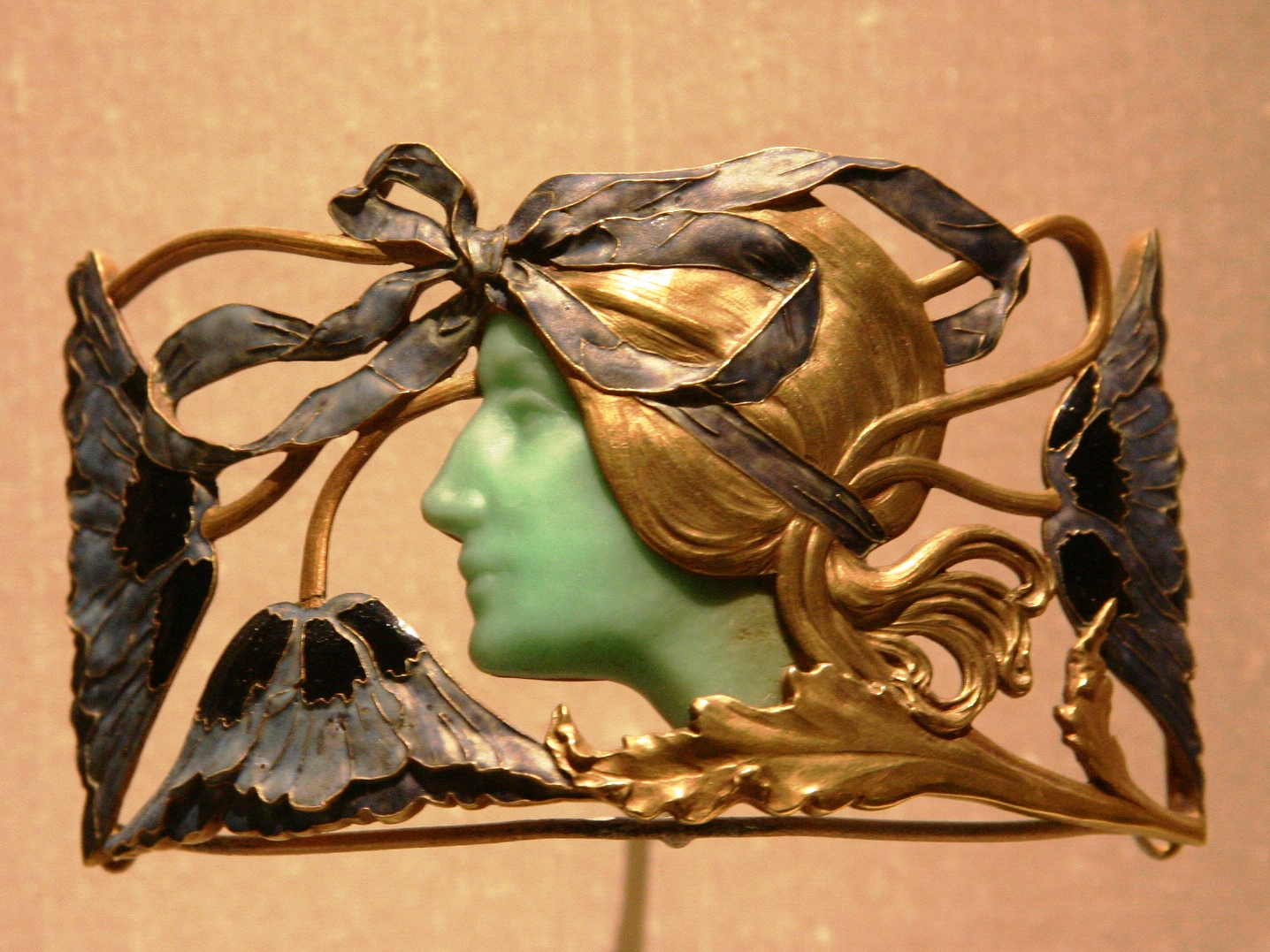 Broche de Lalique